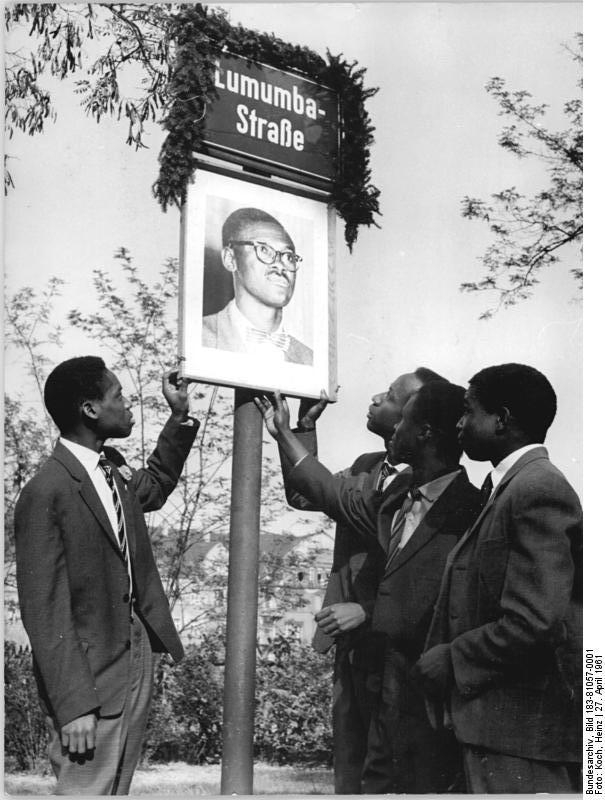 Leipzig, Straßenschild Lumumbastraße Zentralbild Koch 27.4.61 Grundsteinlegung für Lumumba-Denkmal in Leipzig. Zu einem Höhepunkt der Woche der Freundschaft und Solidarität der FDJ gestaltete sich am 26.4.1961 eine Großkundgebung vor dem Leipziger Institut für Ausländerstudium. Der Sekretär des Zentralrats der FDJ und Vizepräsident der deutsch-afrikanischen Gesellschaft in der DDR, Werner Lamberz, legte vor dem bekannten Institut den Grundstein für ein Lumumba-Denkmal, während die tausende Leipziger Jugentlichen und die Studenten aus 67 Ländern der Erde in tiefem Schweigen des kongolesischen Nationalhelden gedachten. Gleichzeitig wurde die Strasse, in der das Ausländerinstitut liegt, in Lumumba-Strasse umbenannt. (Näheres siehe ADN-Meldung 221 v. 26.4.1961) UBz: Kongolesische Studenten der Leipziger Karl-Marx-Universität am Strassenschild der Lumumba-Strasse.